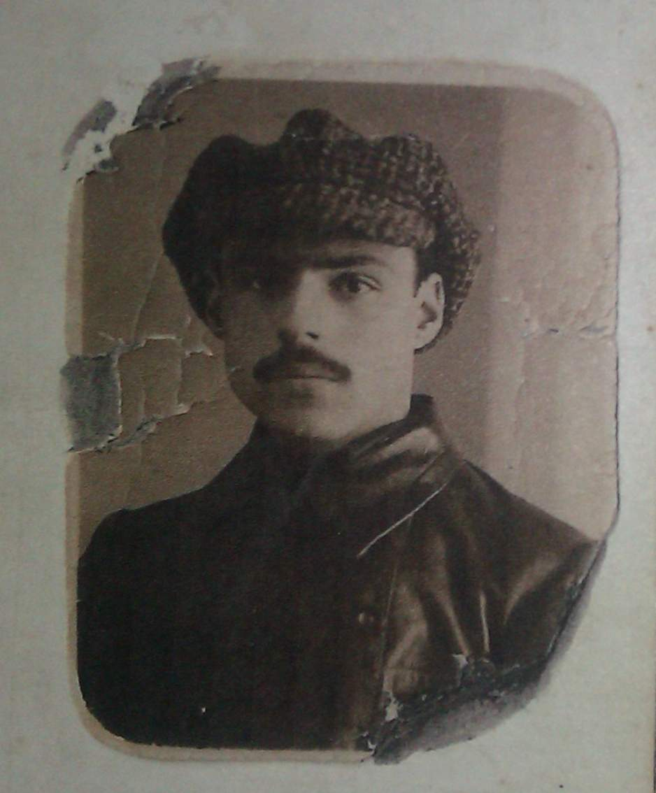 Iliya Hadhigeorgiev